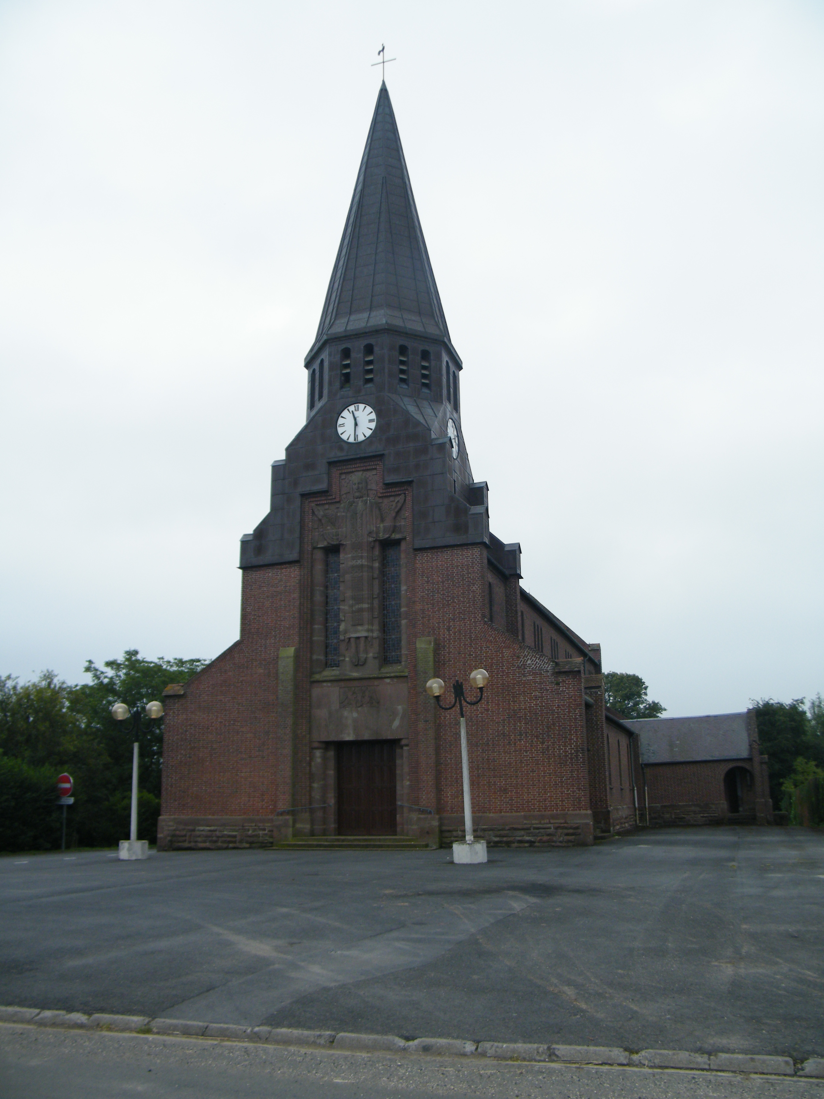 Eglise.